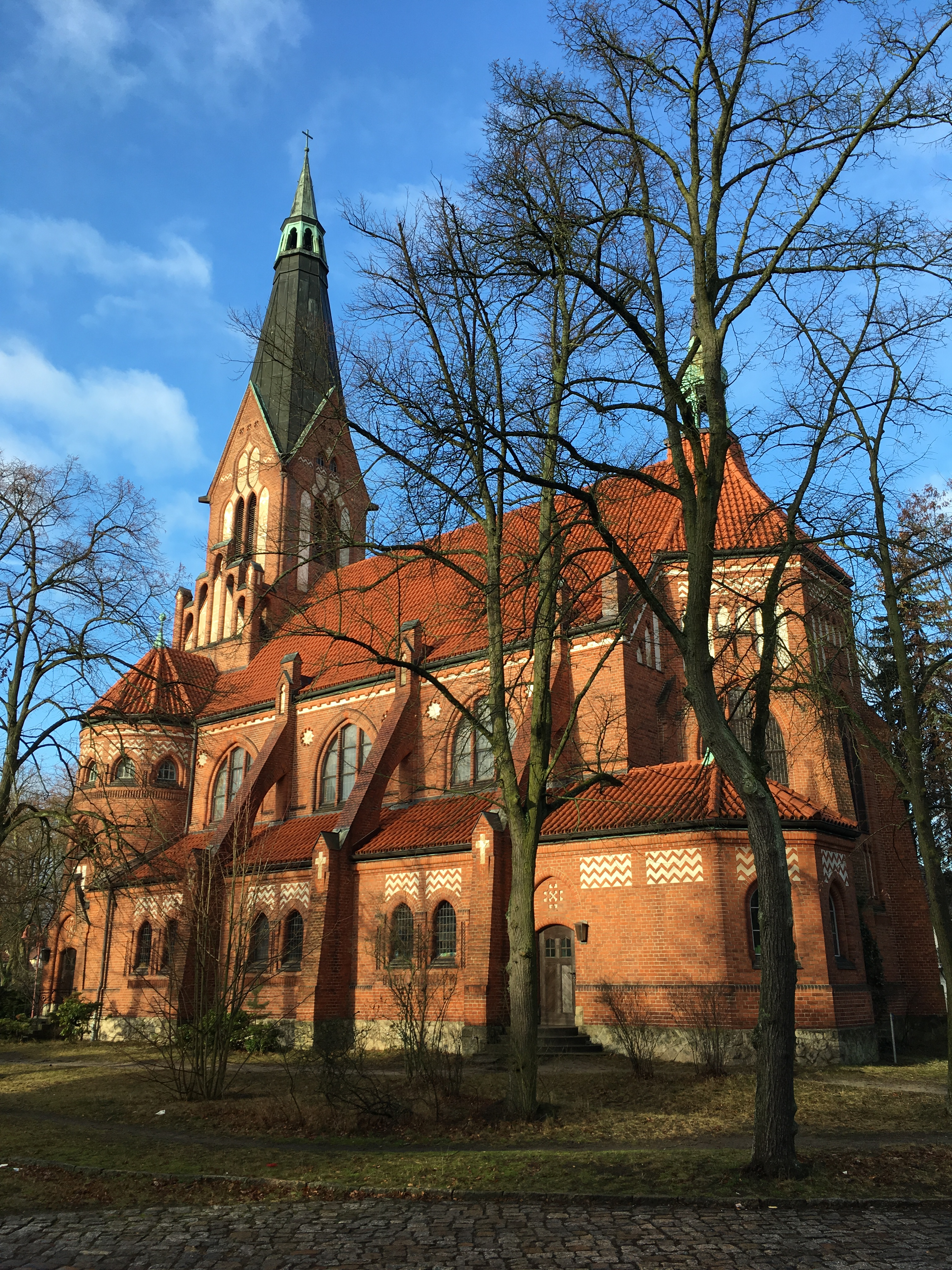 Die Dorfkirche in Eichwalde im Landkreis Dahme-Spreewald im Land Brandenburg entstand im Jahr 1908. Auf der Empore steht die einzige noch erhaltene Parabrahm-Orgel der Welt.